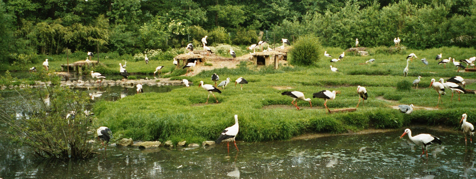 Störche im NaturZoo Rheine